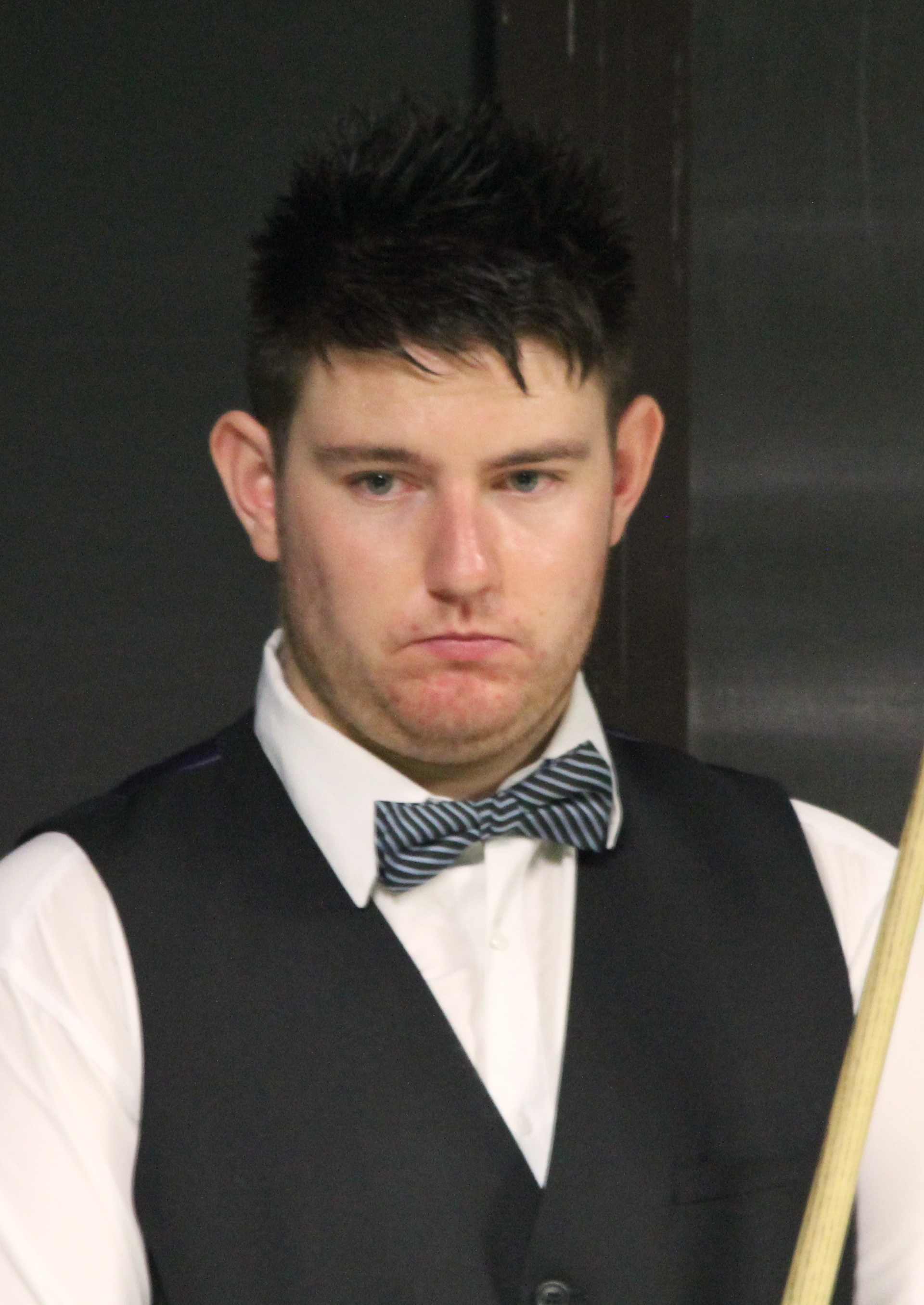 Kurt Dunham beim Paul Hunter Classic 2016